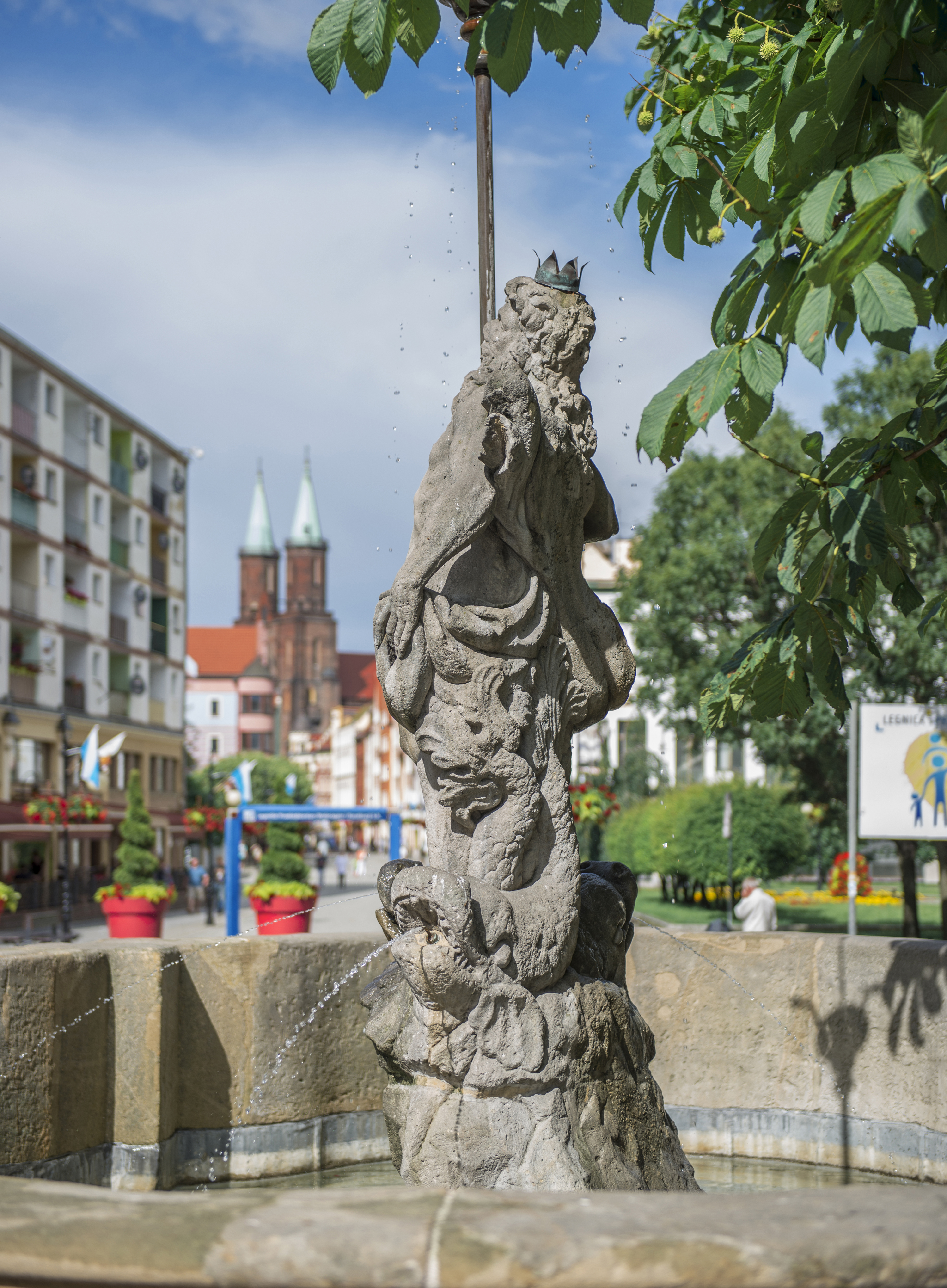 Fontanna Neptuna